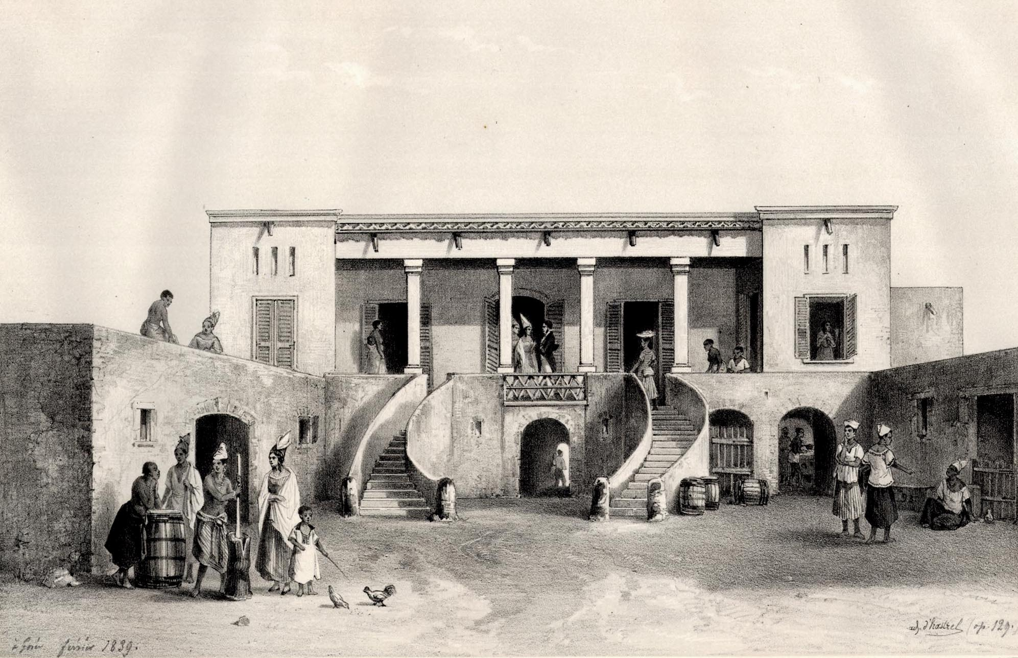 Maison de la signare Anna Colas à Gorée peinte par d'Hastrel de Rivedoux en 1839 (image recadrée)